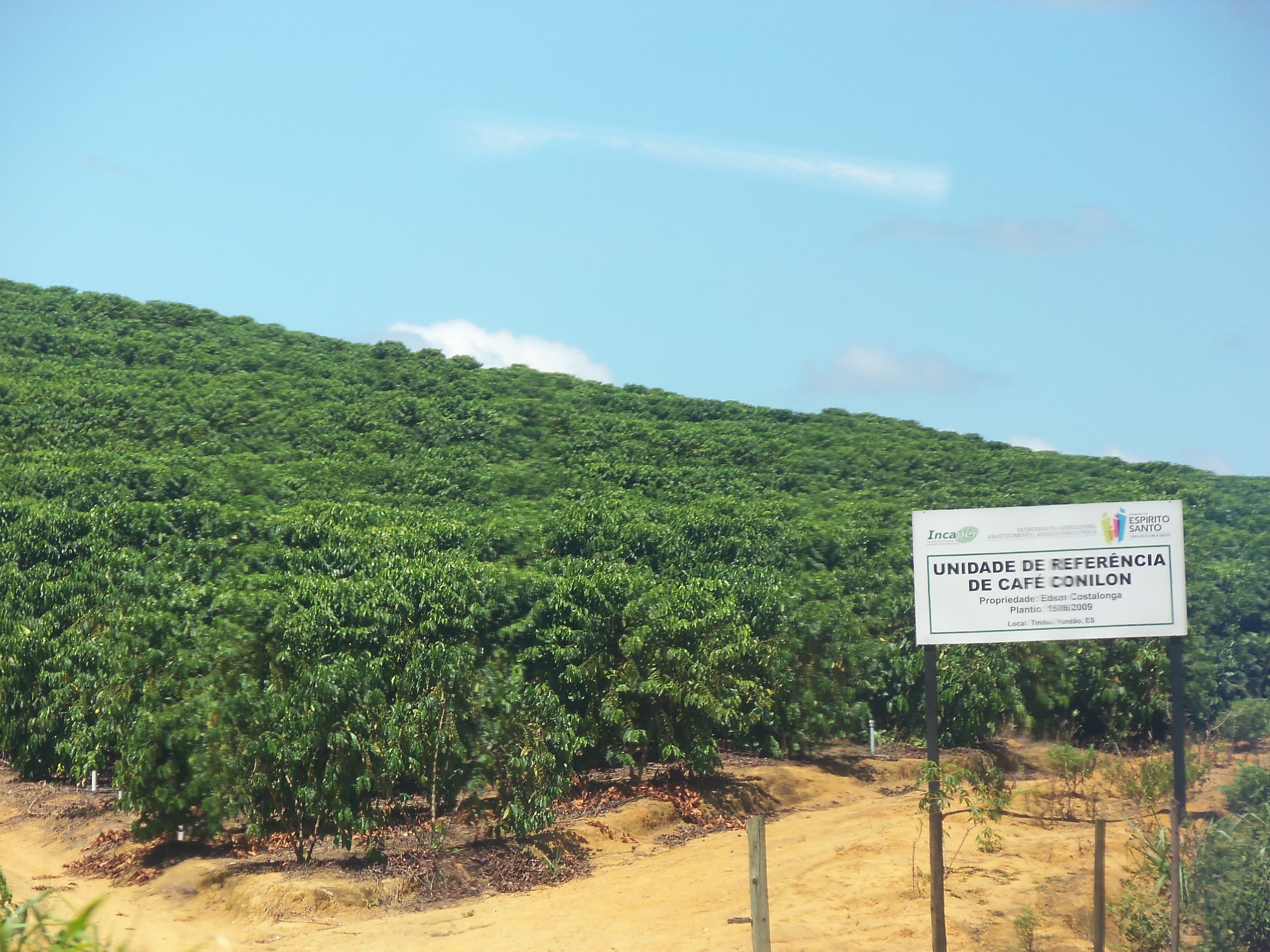 Unidade de referência de café conilon, em Timbuí, vista da BR-101. Propriedade de Edson Costalonga.